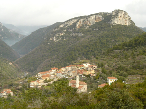 Monte Corno,Val Ponci,Verzi